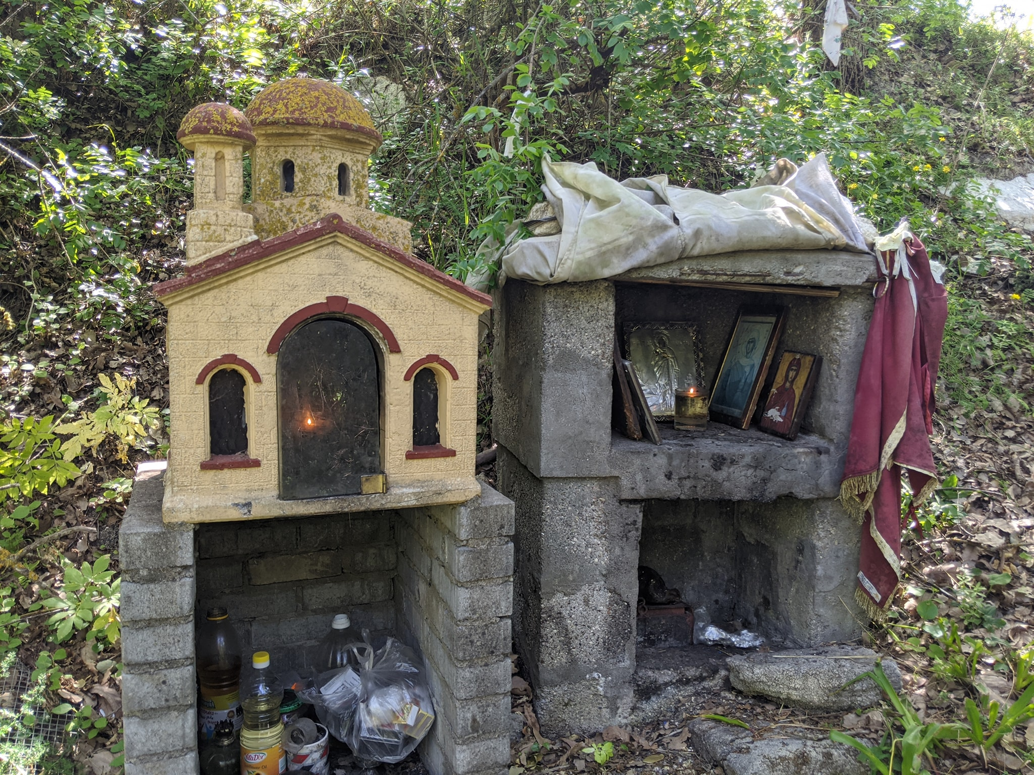 Αγιά Αναστασία- ξωκλήσι στην Παλιά Θελέτρα